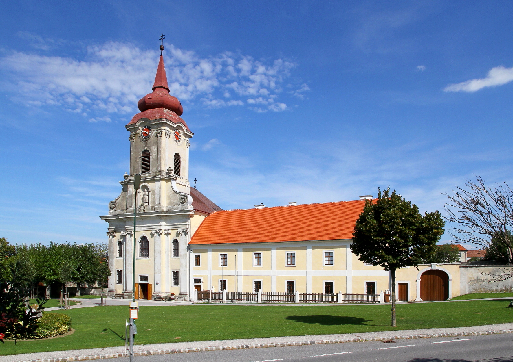 Die Pfarrkirche hl. Johannes d. T. in der burgenländischen Gemeinde Stotzing.